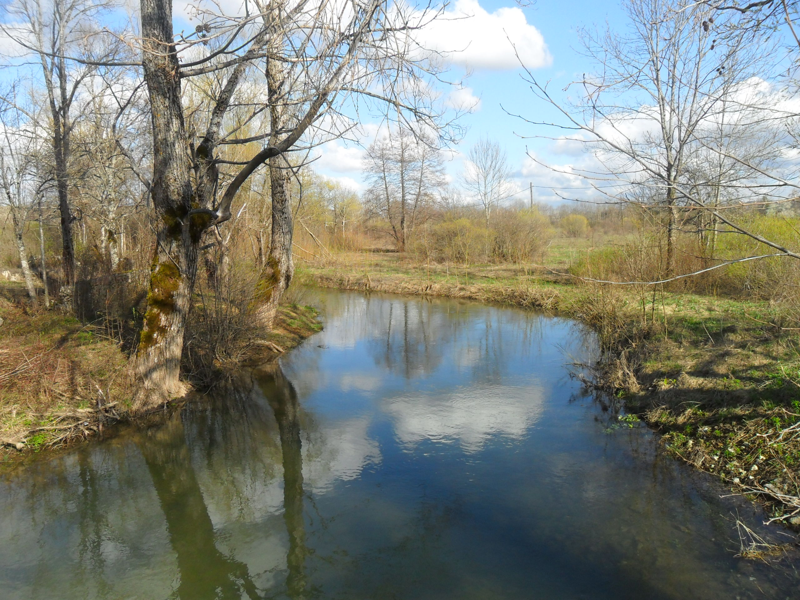 Rijeka Lika , Medak